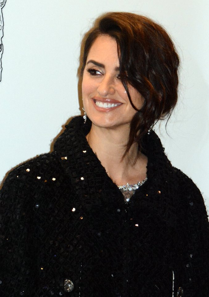 Penelope Cruz à la cérémonie des César du cinéma